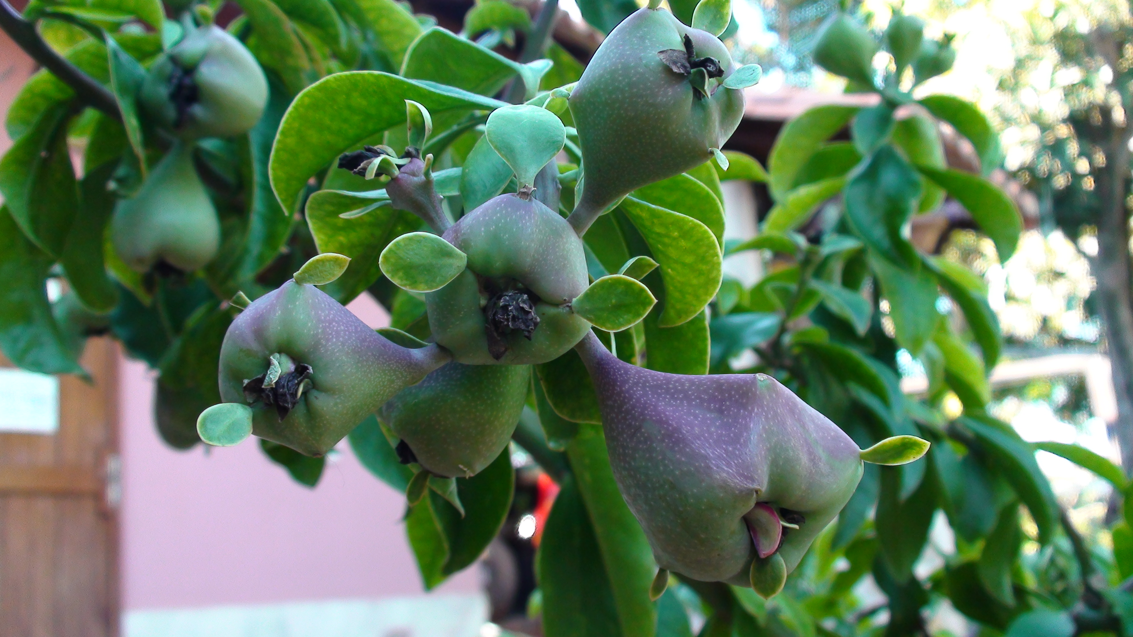 Die Früchte werden in Gruppen ausgebildet.